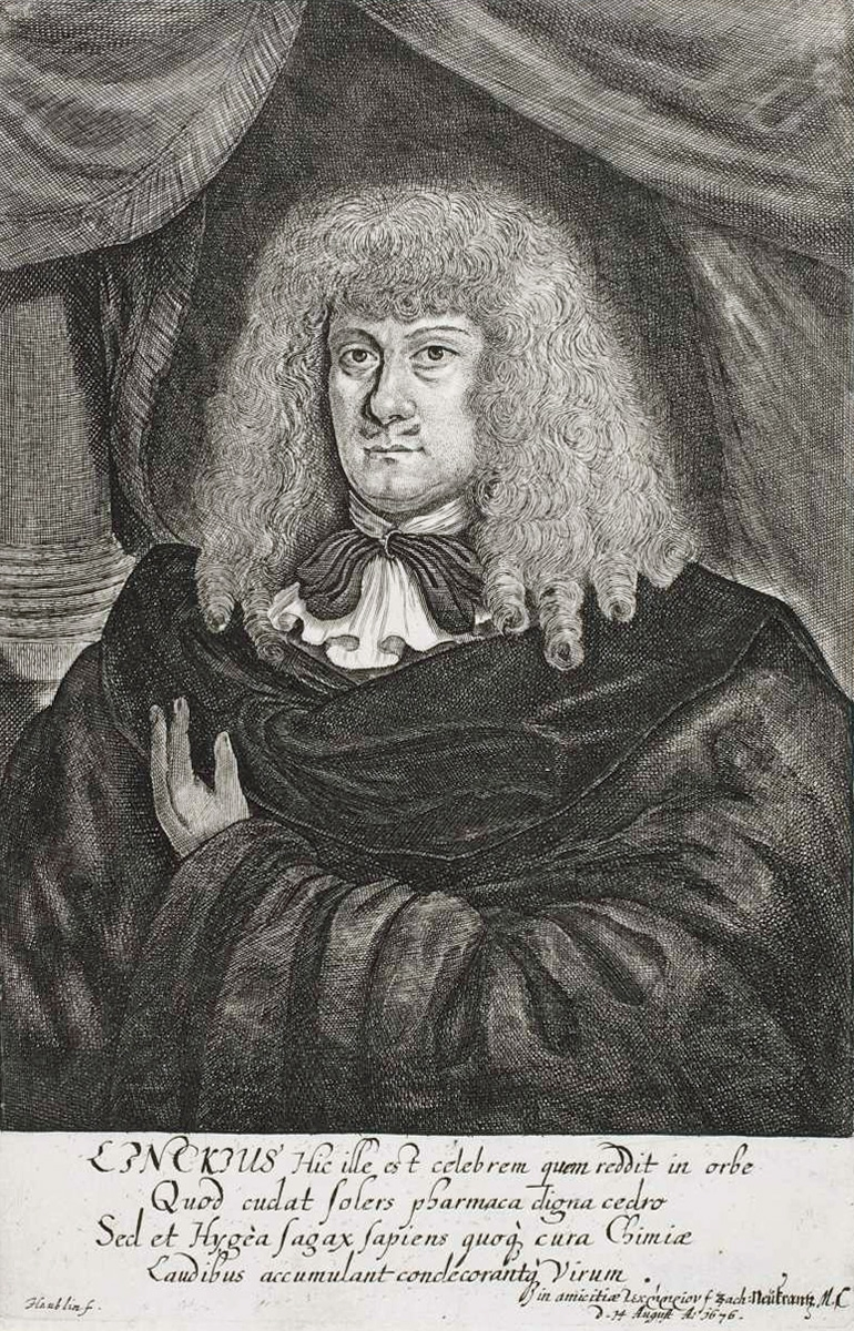 Heinrich Linck, Apotheker in Leipzig, Begründer des Leipziger Naturalienkabinetts